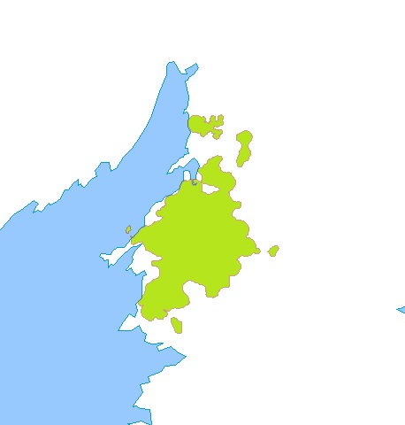 Kart over tettstedet Løding på Tverlandet, øst i Bodø kommune.